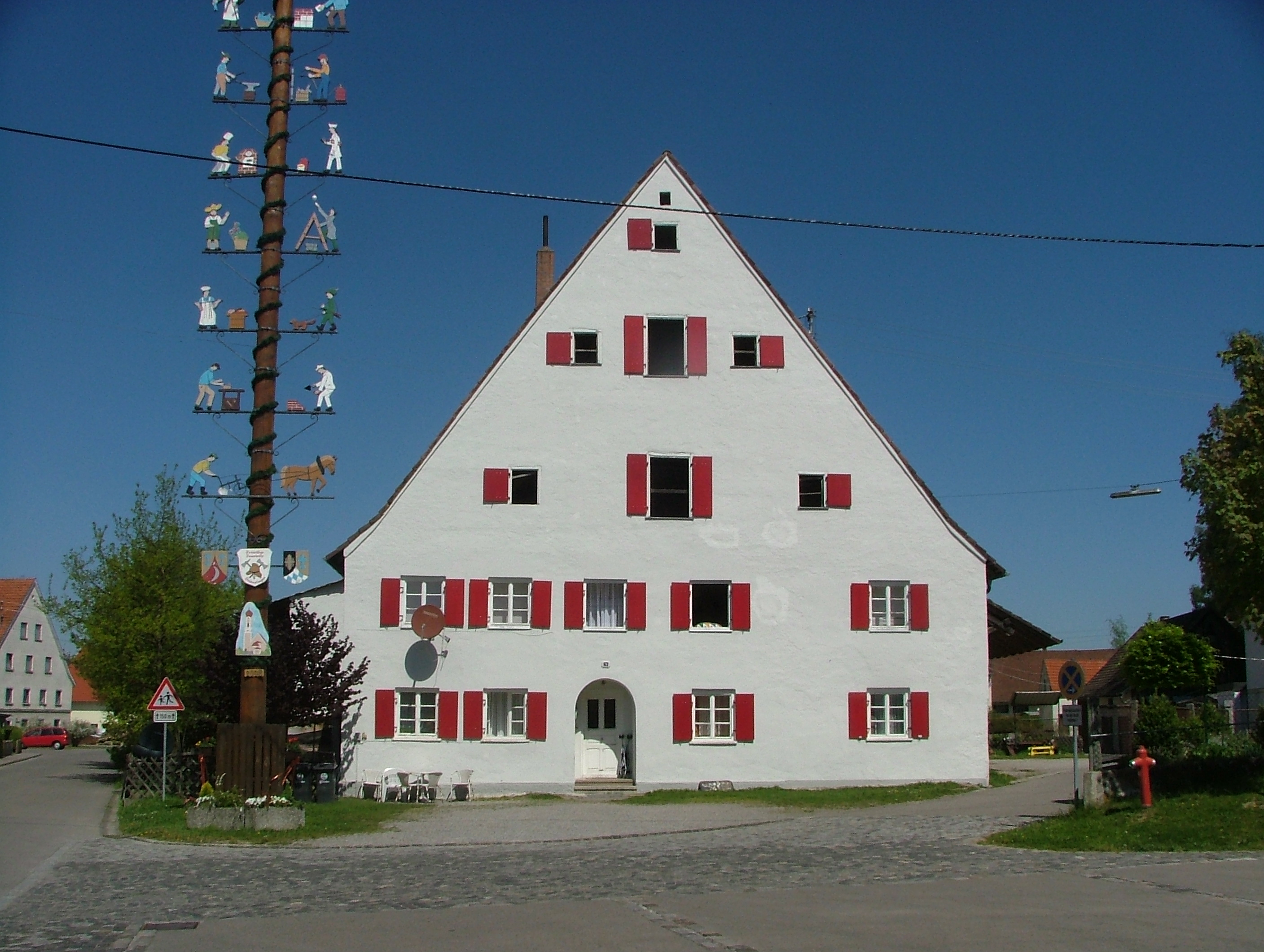 Heimertingen Ortsmitte